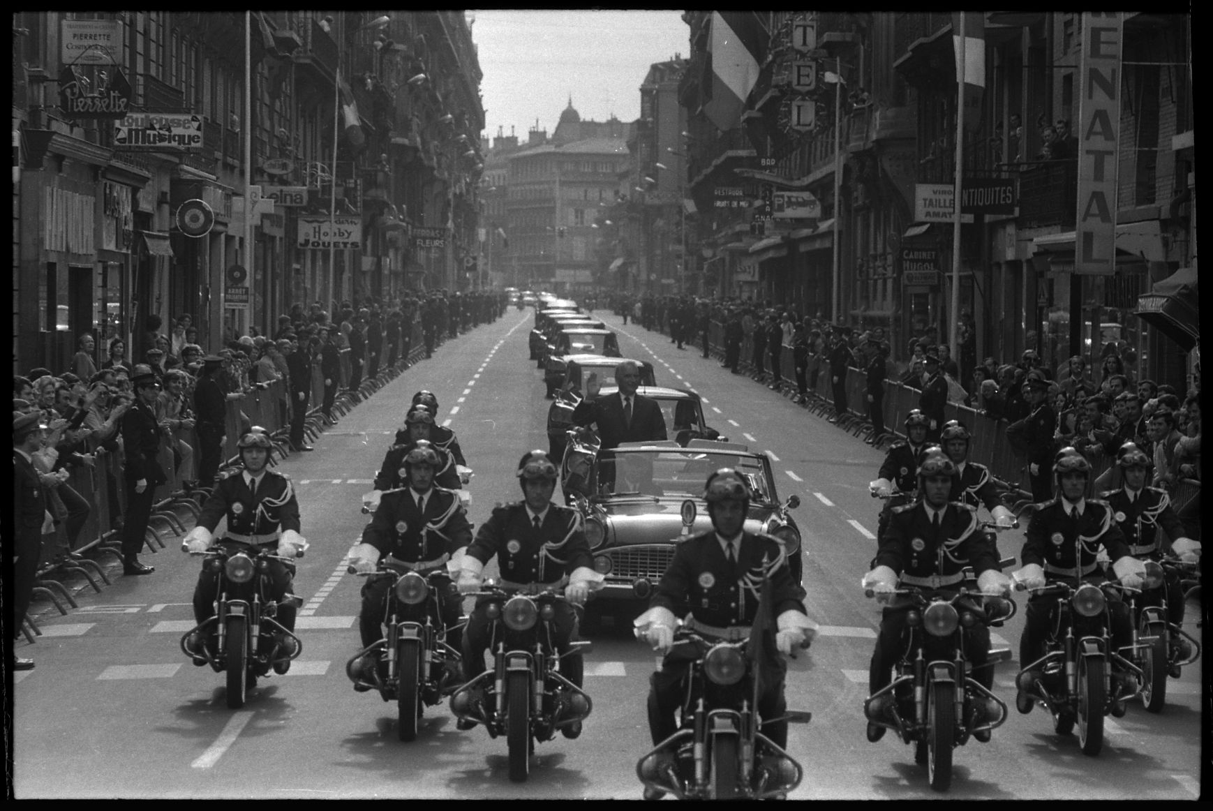 Rue de Metz. 7 mai 1971. Vue du convoi présidentiel de Georges Pompidou ; motards de la police précédent la voiture décapotable dans laquelle Georges Pompidou, debout, salue la foule de la main ; file de voitures jusqu'au bout de la rue derrière la décapotable ; foule de part et d'autre de la rue derrière des barrières métalliques surveillées par des policiers postés à intervalle régulier tout le long des rangées de grilles.